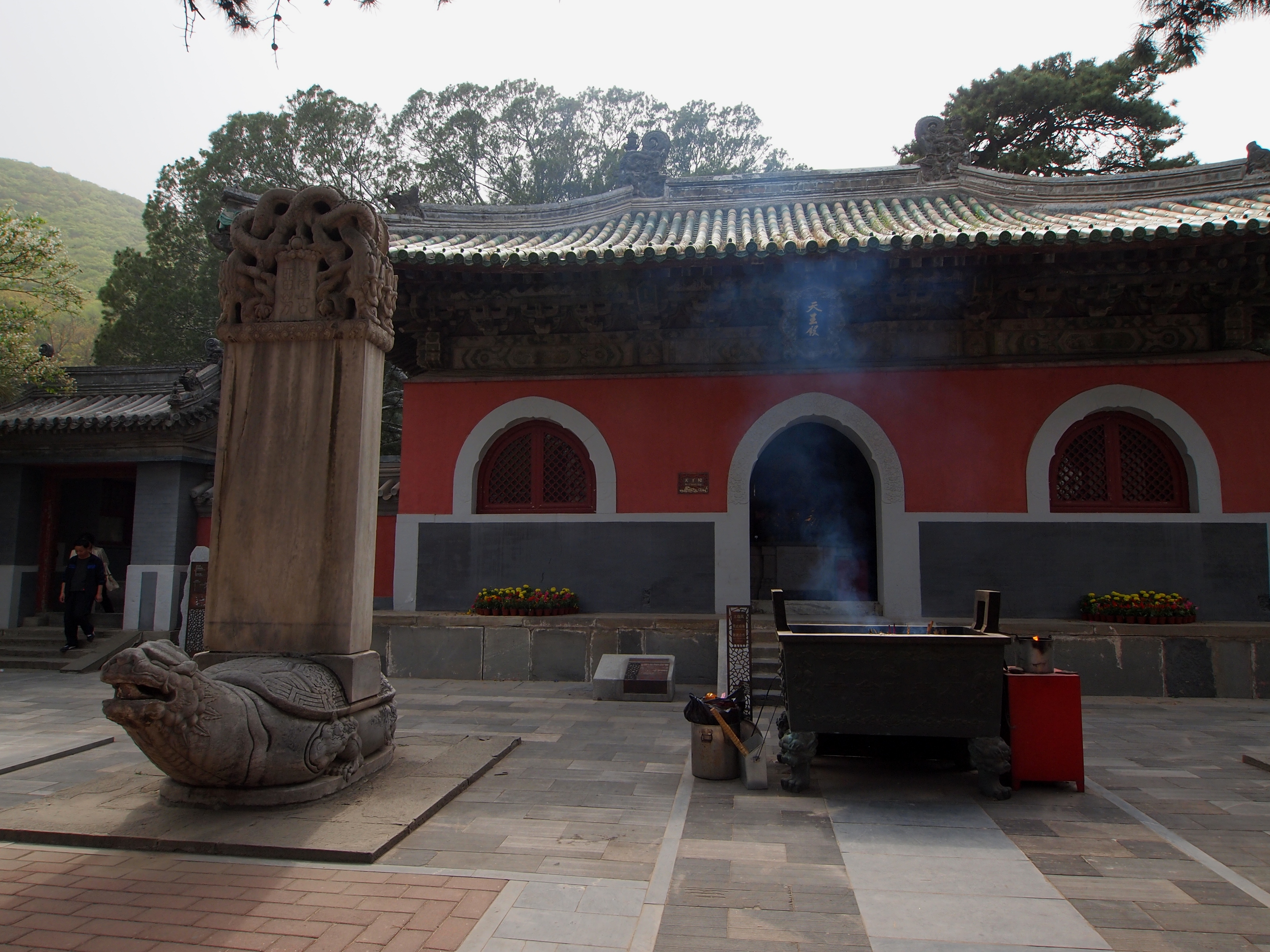 戒台寺天王殿 - Heavenly Kings Hall - 2012.04